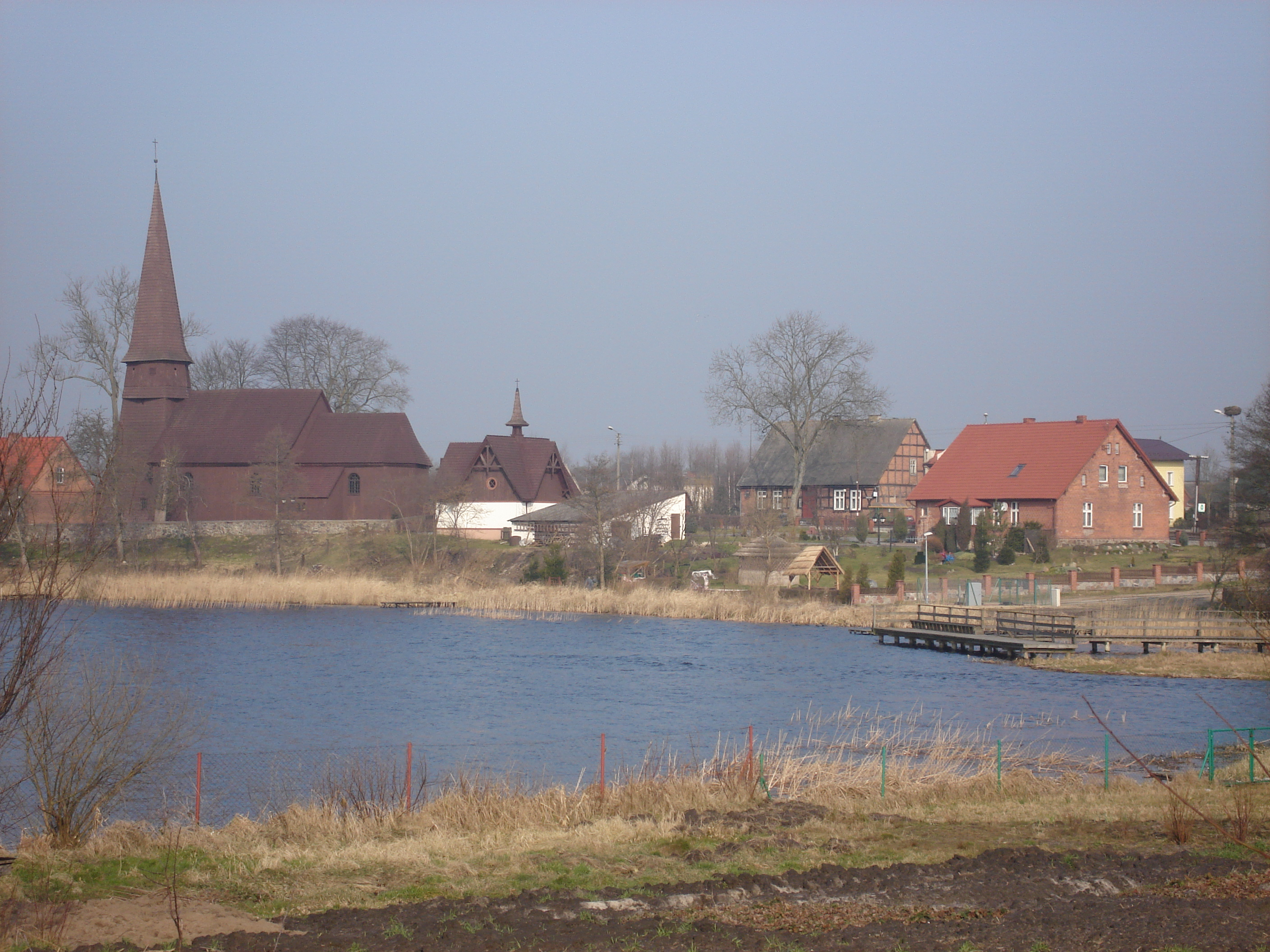 Lesno, gm.Brusy